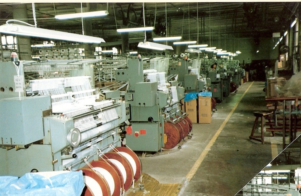 Raschelmaschinen Typ Müller-Frick